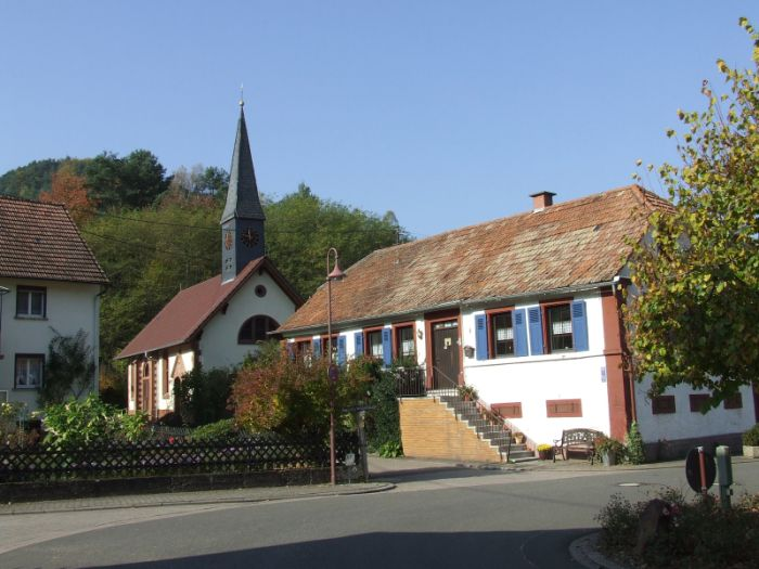 Dimbach - Ortmitte